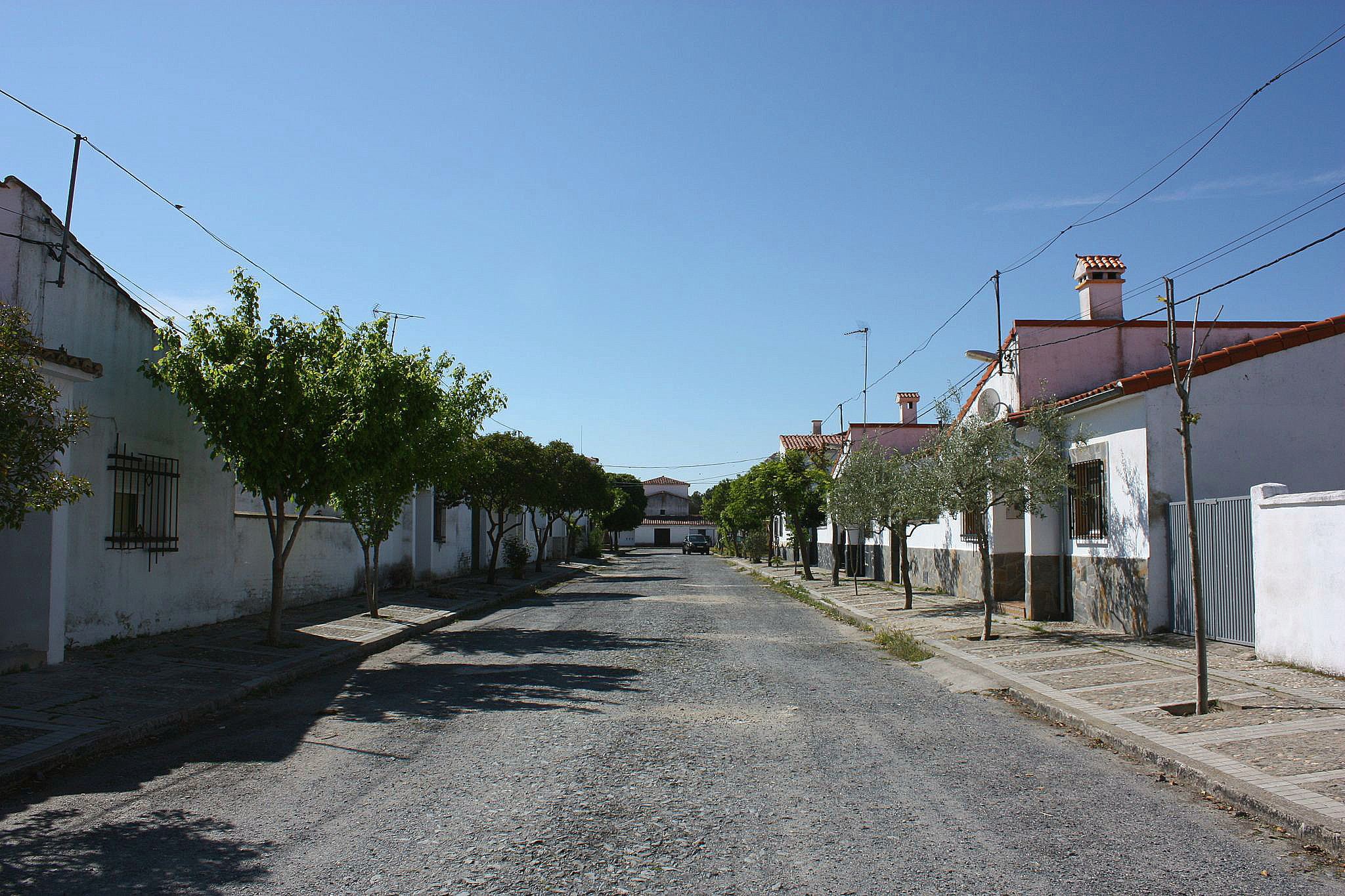 Valderrosas es un poblado de colonización situado en el municipio de Carcaboso, en la provincia de Cáceres, España. Fue fundado entre los años 1960 y 1970 y tiene unos 50 habitantes. Está considerado como un barrio de Carcaboso, aunque tiene código postal propio. El pueblo está formado por una plaza y algunas calles. Tiene una escuela en desuso e iglesia propia.(